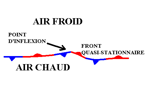 Début de cyclogénèse par cration d'un point d'inflexion sur un front stationnaire/Begin of cyclogenesis by creating an inflexion point on a stationnary front